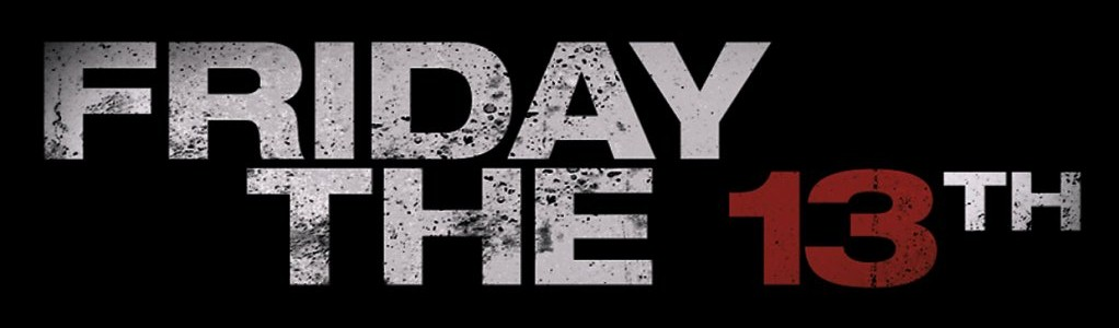 Friday the 13th 2009 logo